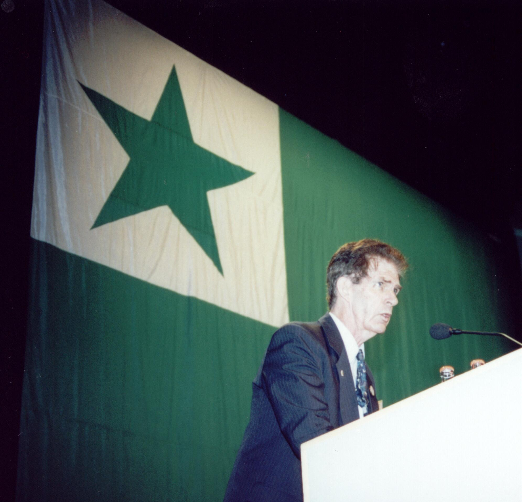 Universala Kongreso de Esperanto, Gotenburgo 2003. Gxenerala Direktoro Trevor Steele, inauxguro.